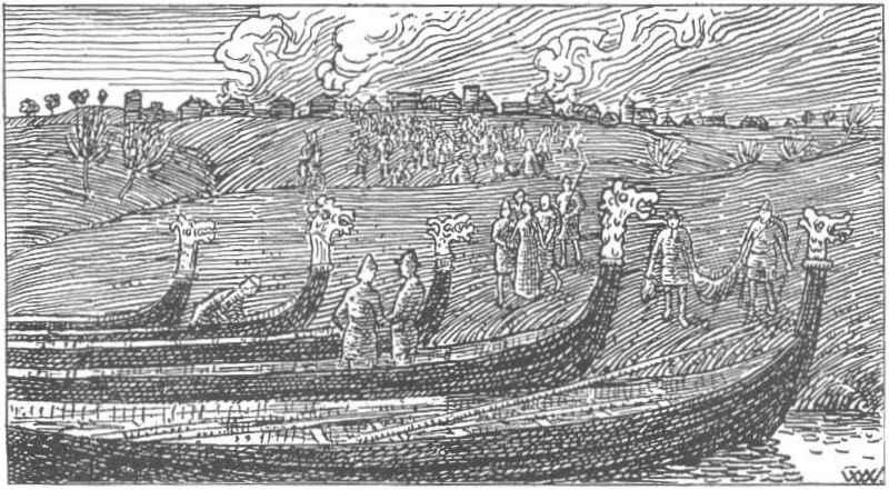 Illustration for Harald Hardrådes saga, Heimskringla 1899-edition.